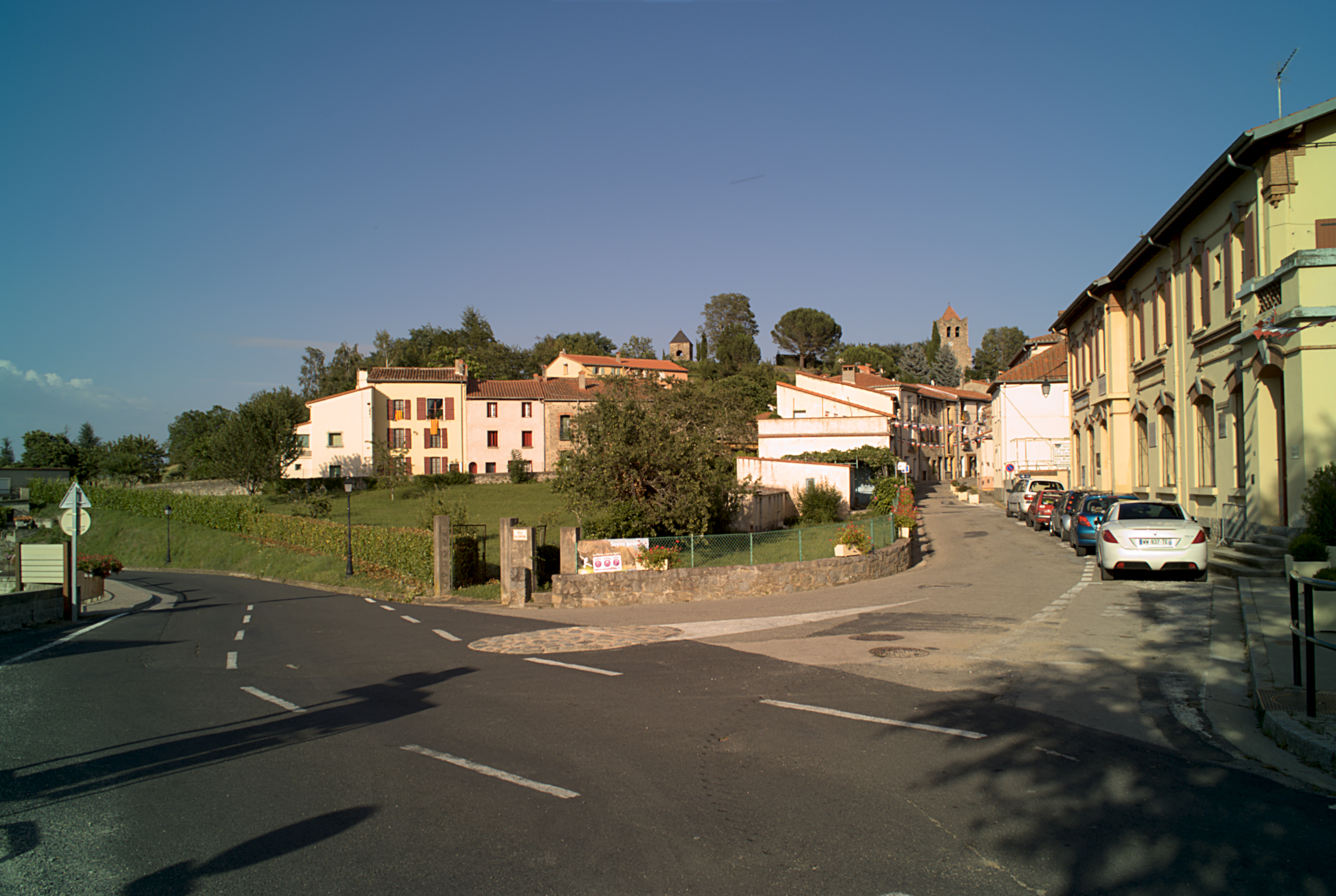 Carrefour de la rue Paul Santena et de la rue Abdon Poggi, Serralongue (Pyrénées-Orientales, Languedoc-Roussillon, France)